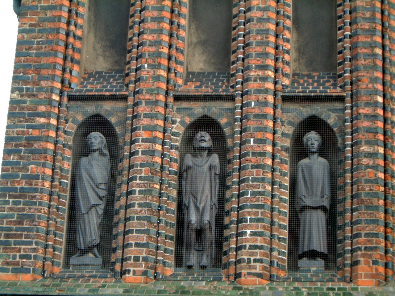 Skulpturen von Ernst Barlach an der Fassade der Katharinenkirche